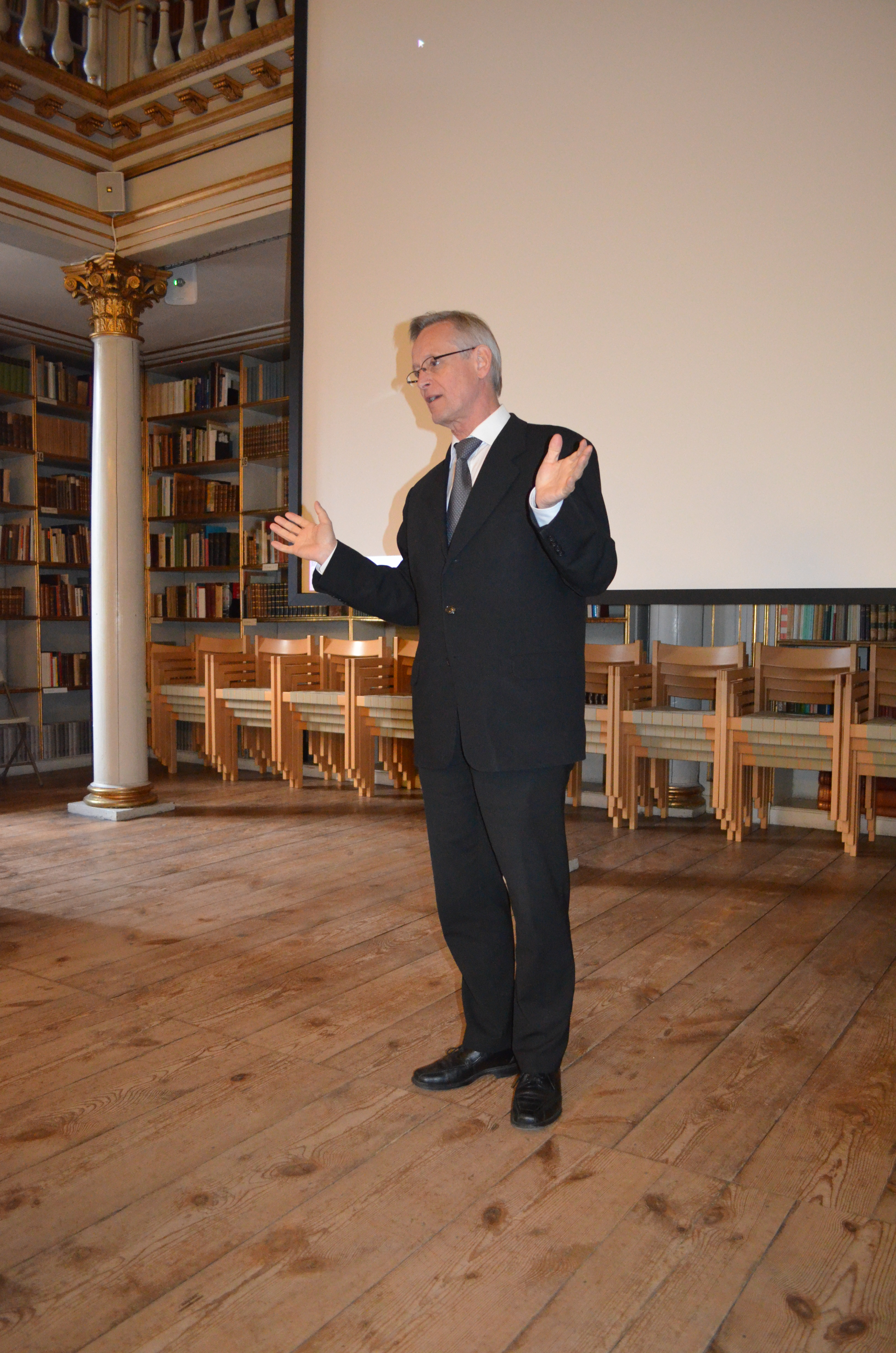 Foto: Peter Wodskou